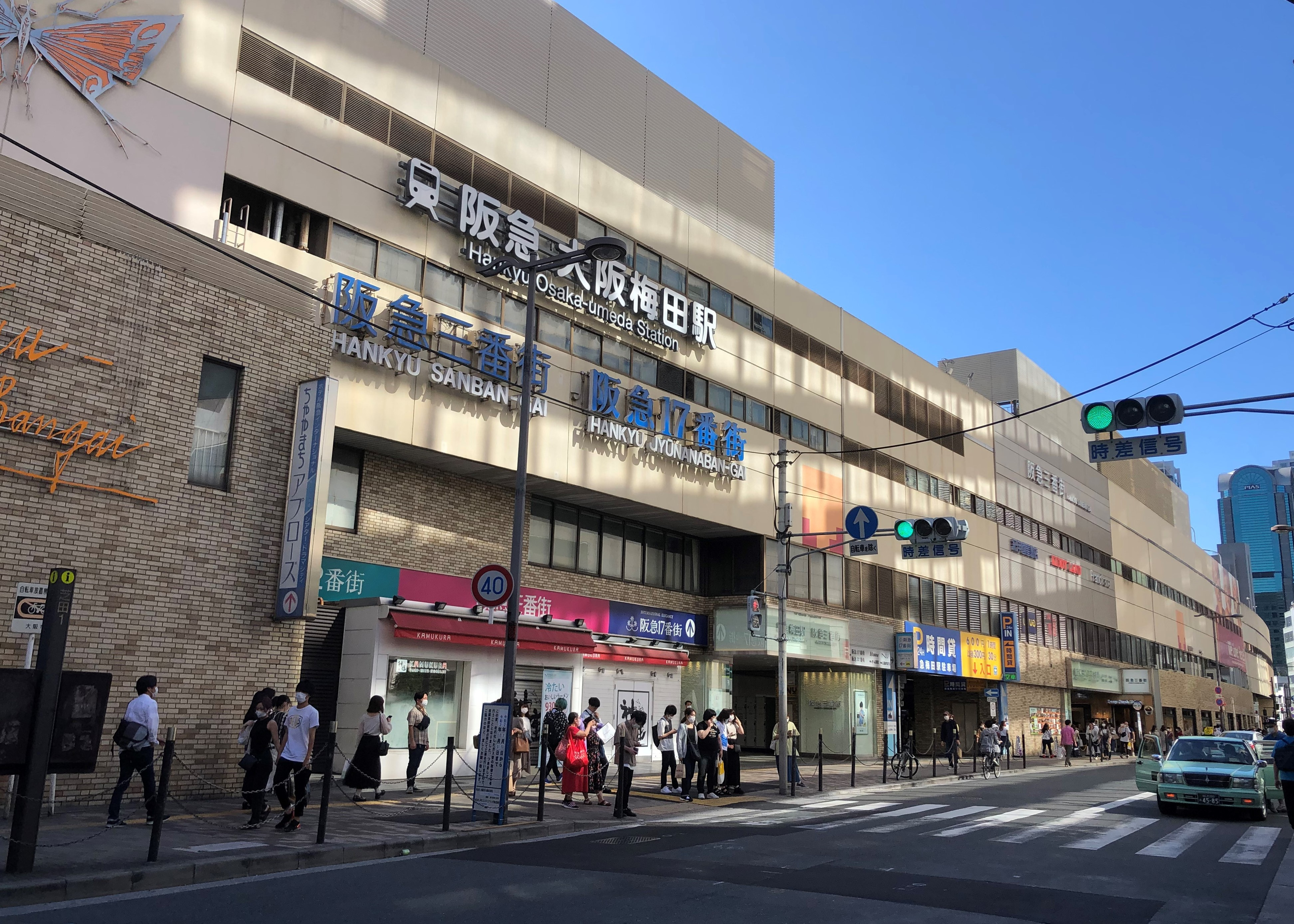 阪急電鉄大阪梅田駅